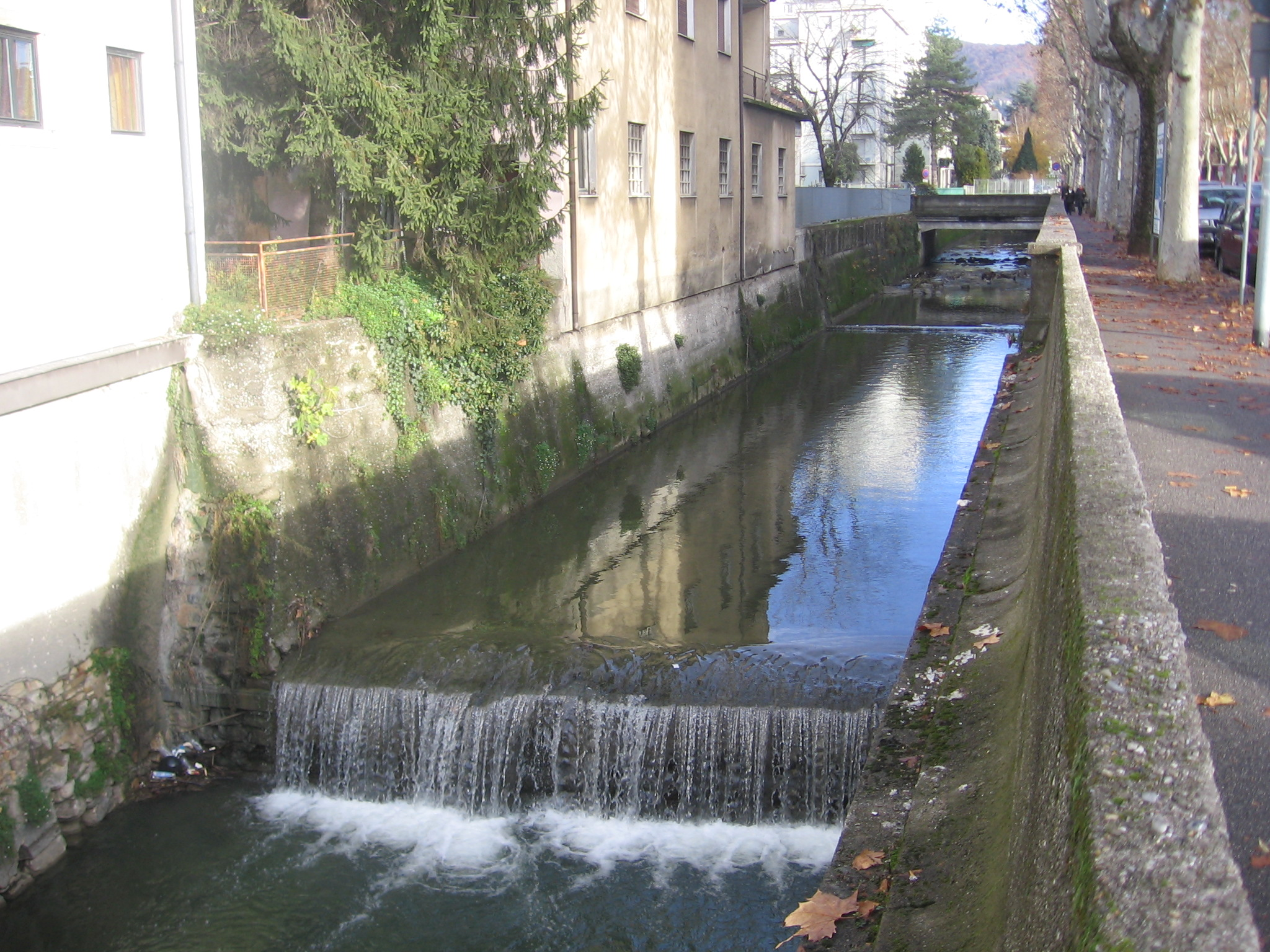 Torrente Morla in via Giulio Cesare a Bergamo.